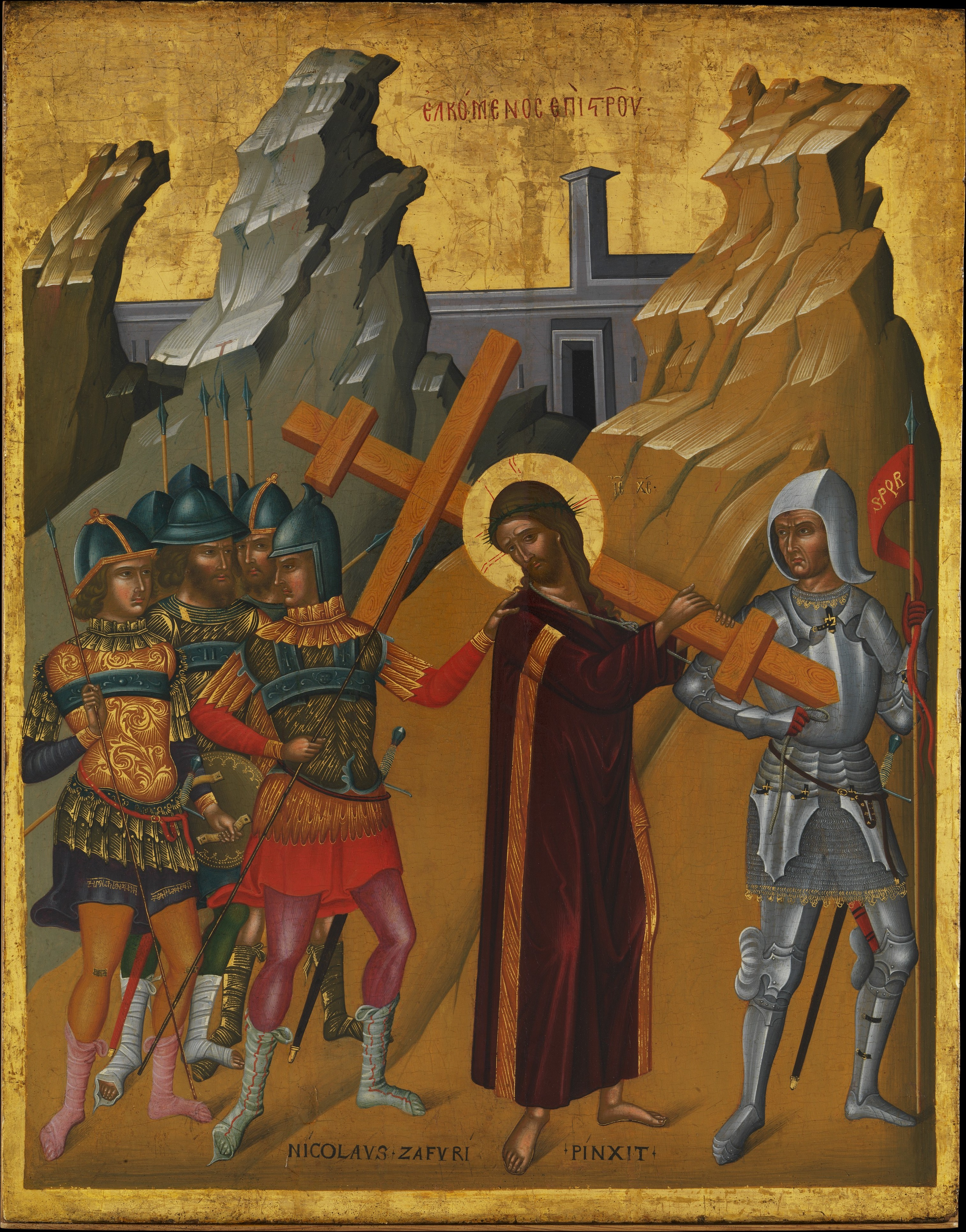 Painting, icon; Paintings